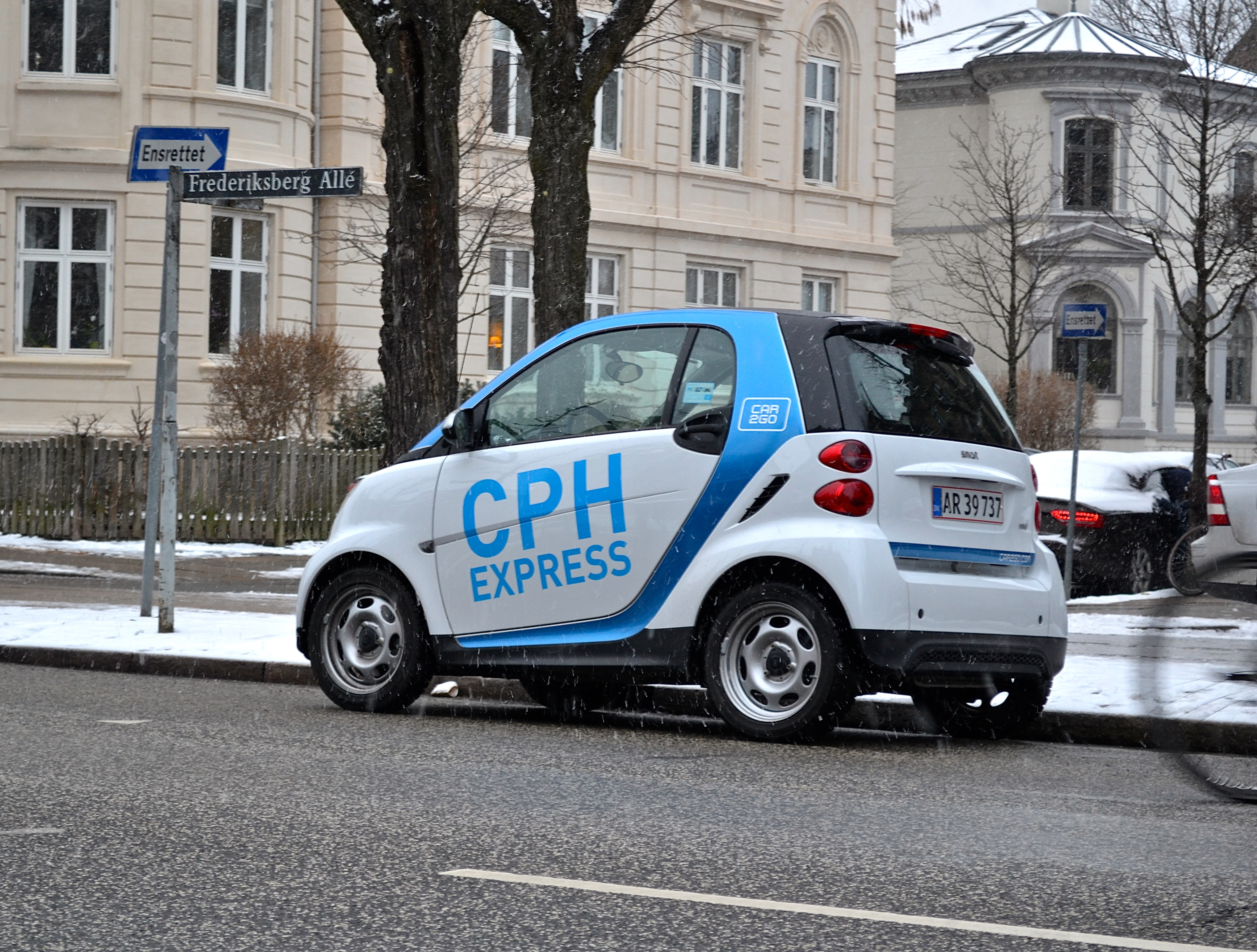 car2go ved Frederiksberg Allé